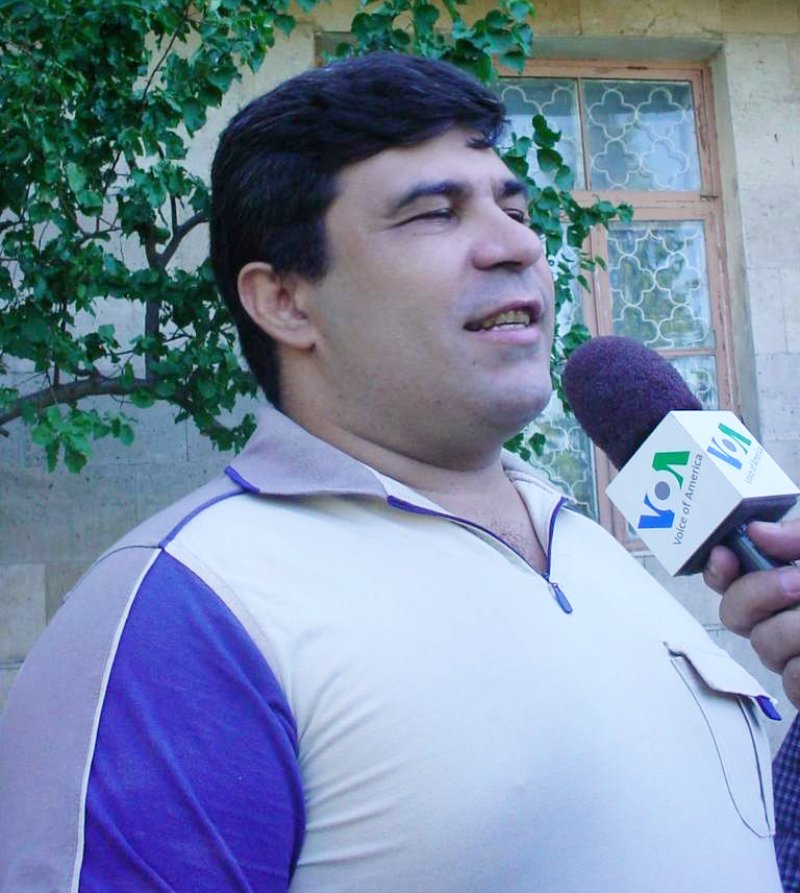 Elmar Hüseynovun "Amerikanın Səsi"nə müsahibəsi